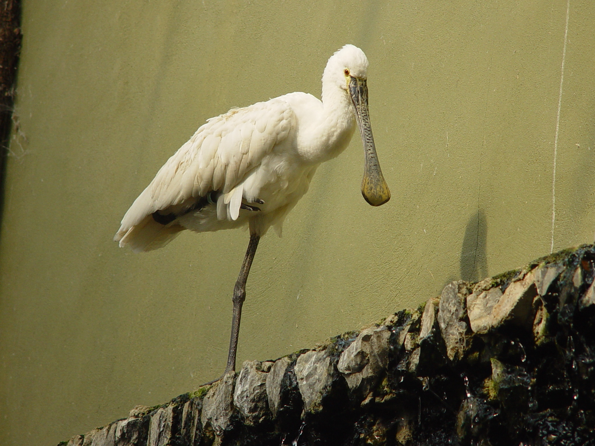 Bogazici Zoo